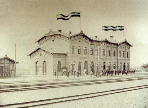 Empfangsgebäude des Demminer Bahnhofs